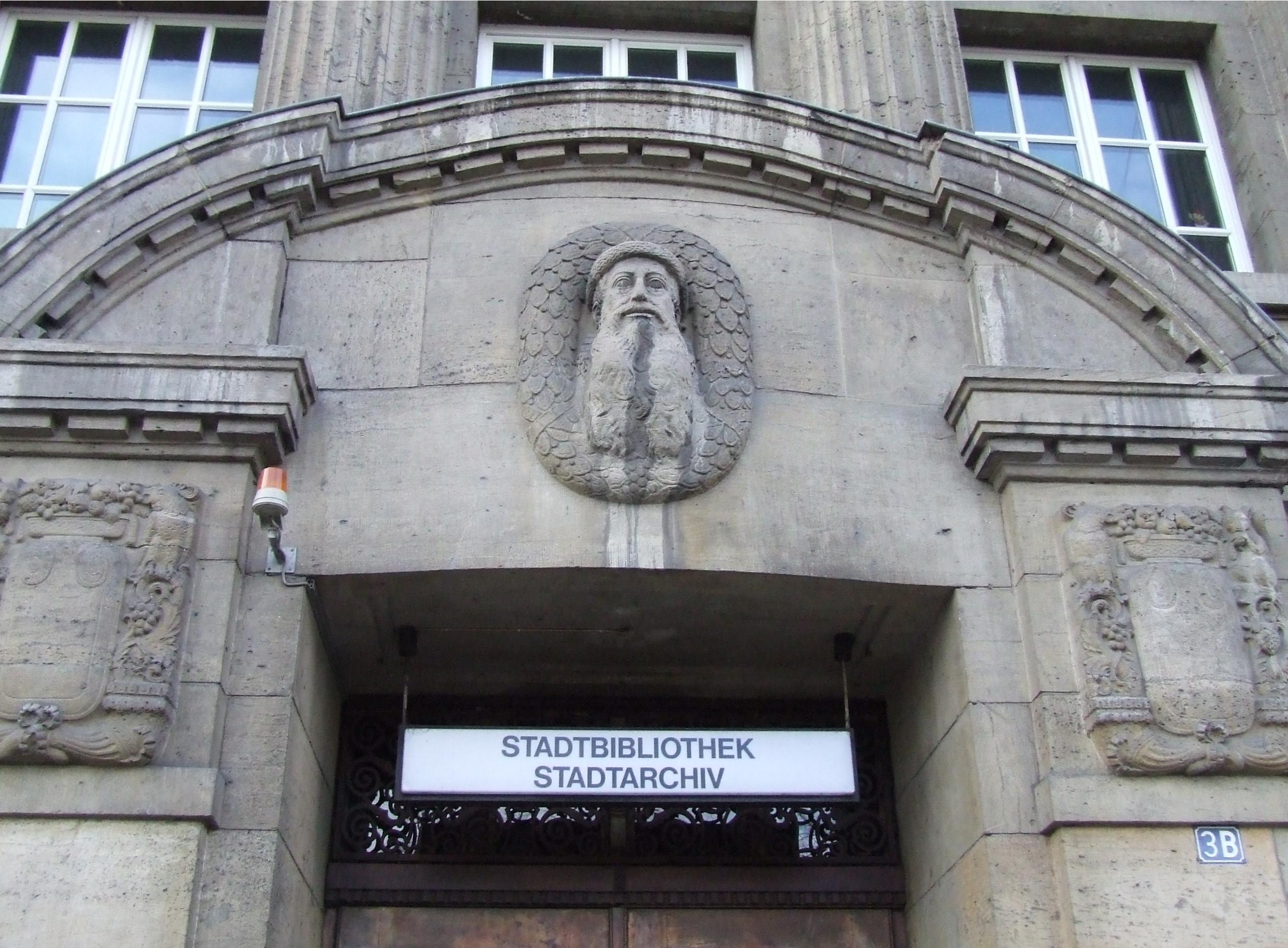 Stadtbibliothek Mainz, Eingangstür